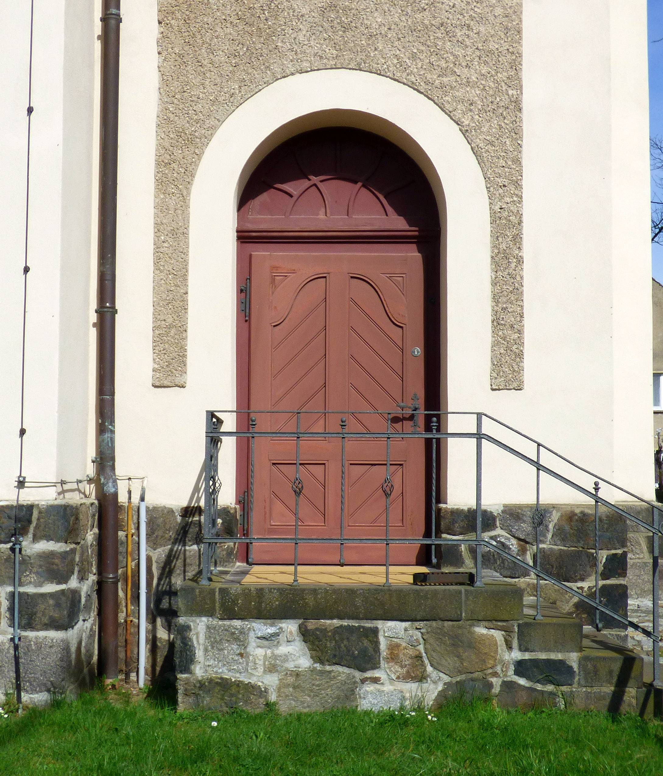 Nordportal der Dorfkirche Nauwalde